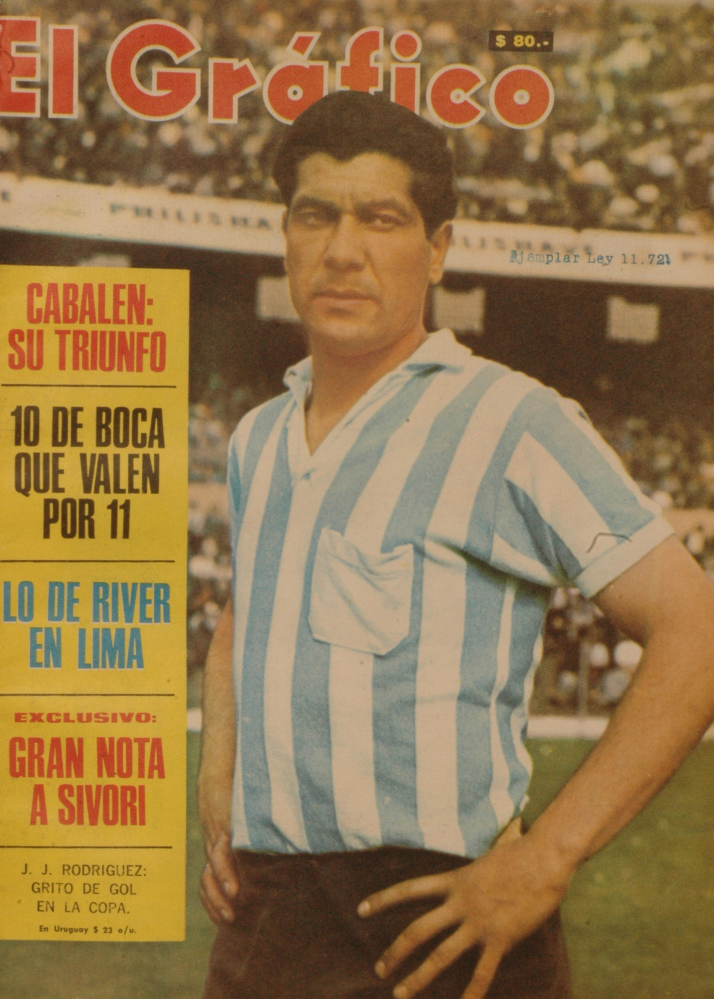 El Grafico del 04 de Julio de 1967. Edicion 2491